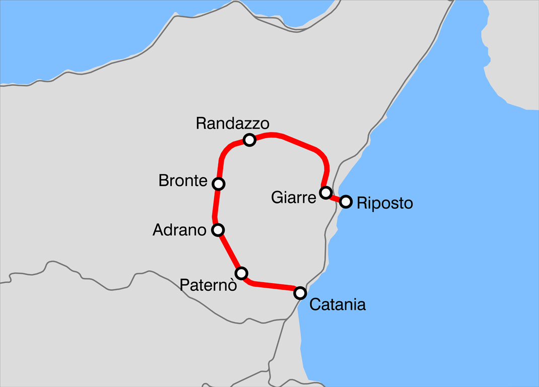 Mappa della ferrovia Circumetnea